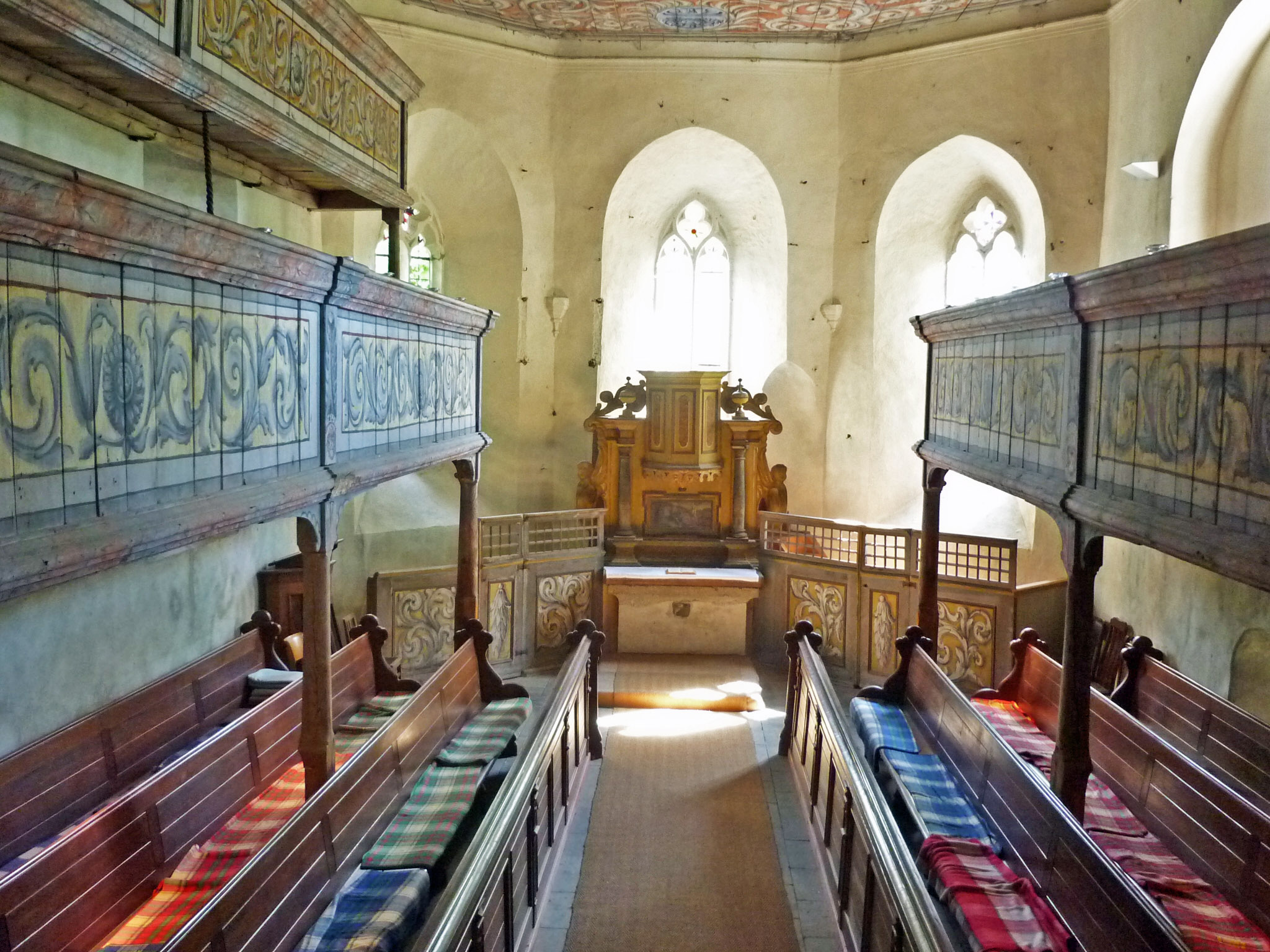 Kamenz, Katechismuskirche, Kirchenraum